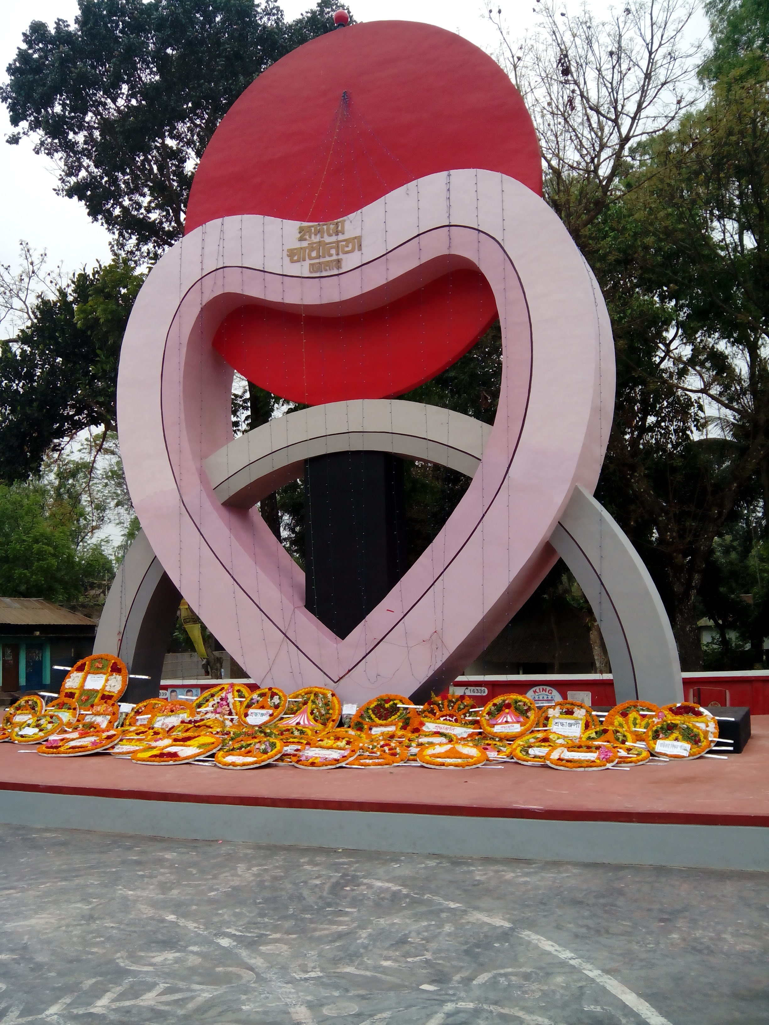 হৃদয়ে স্বাধীনতা